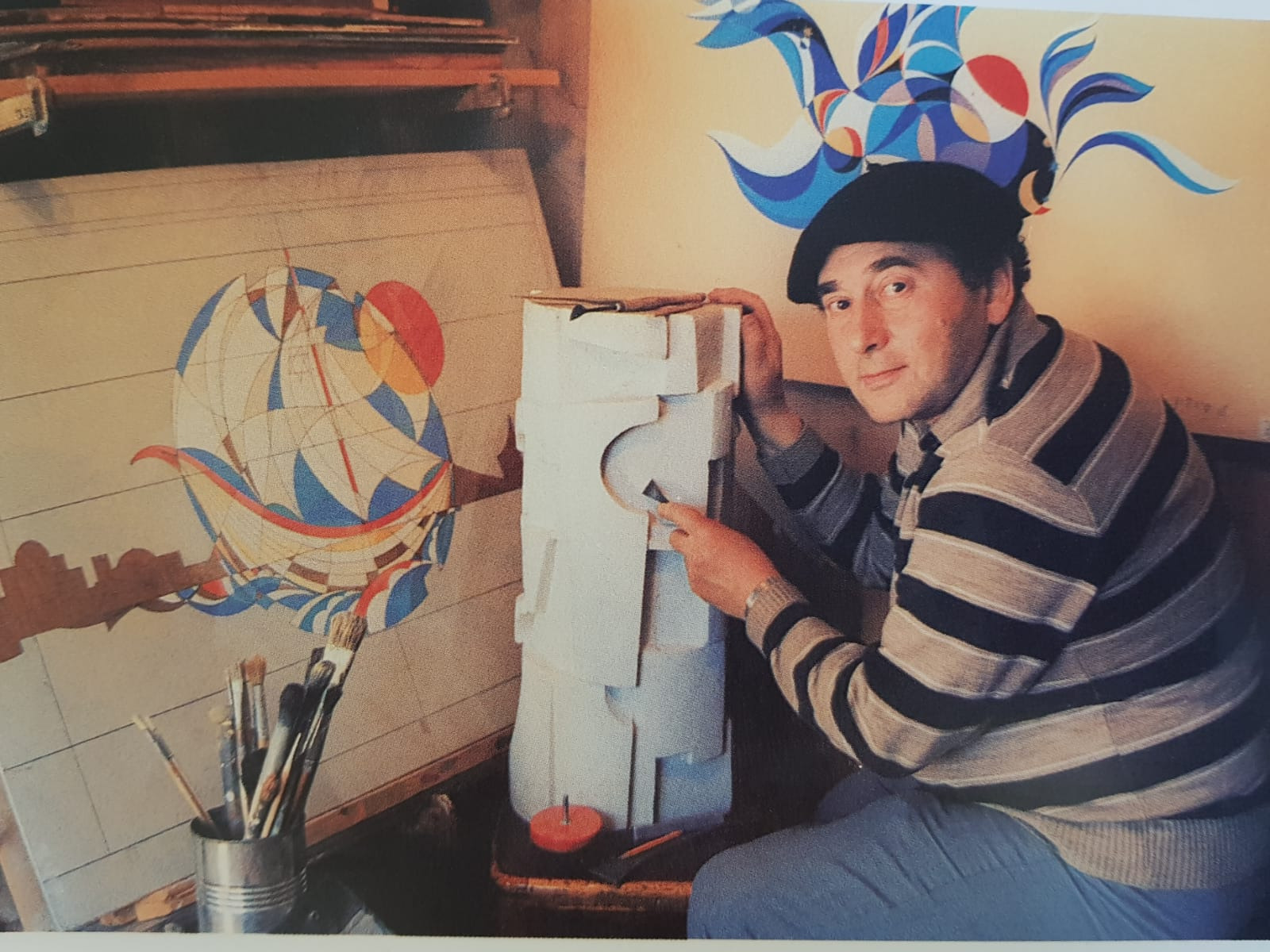 לב סירקין בסטודיו שלו בירושלים